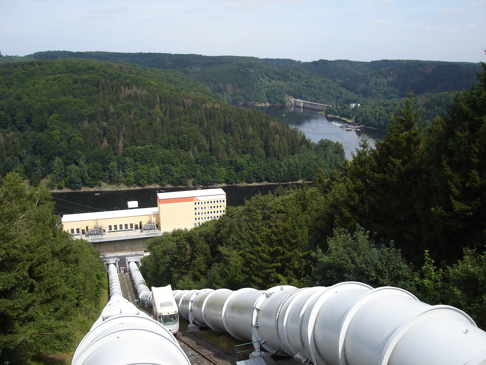 Talsperre Wendefurth im Harz